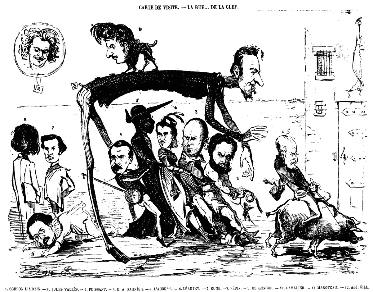 "La Rue ... de la Clef". Caricature de l'équipe du journal La Rue, fermé peu de temps après à cause de la censure. Le titre est une allusion à la prison parisienne des condamnés politiques, Sainte-Pélagie, qui avait son entrée au n° 56 de la rue de la Clé.